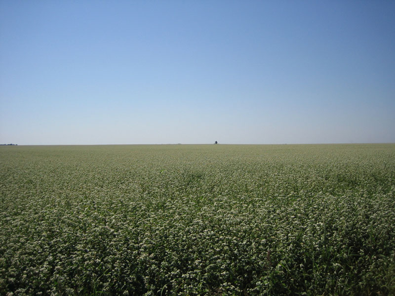 Гречишное поле в Волгоградской области. Снято летом 2006.